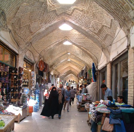 Bazaar in Zanja, Iran.